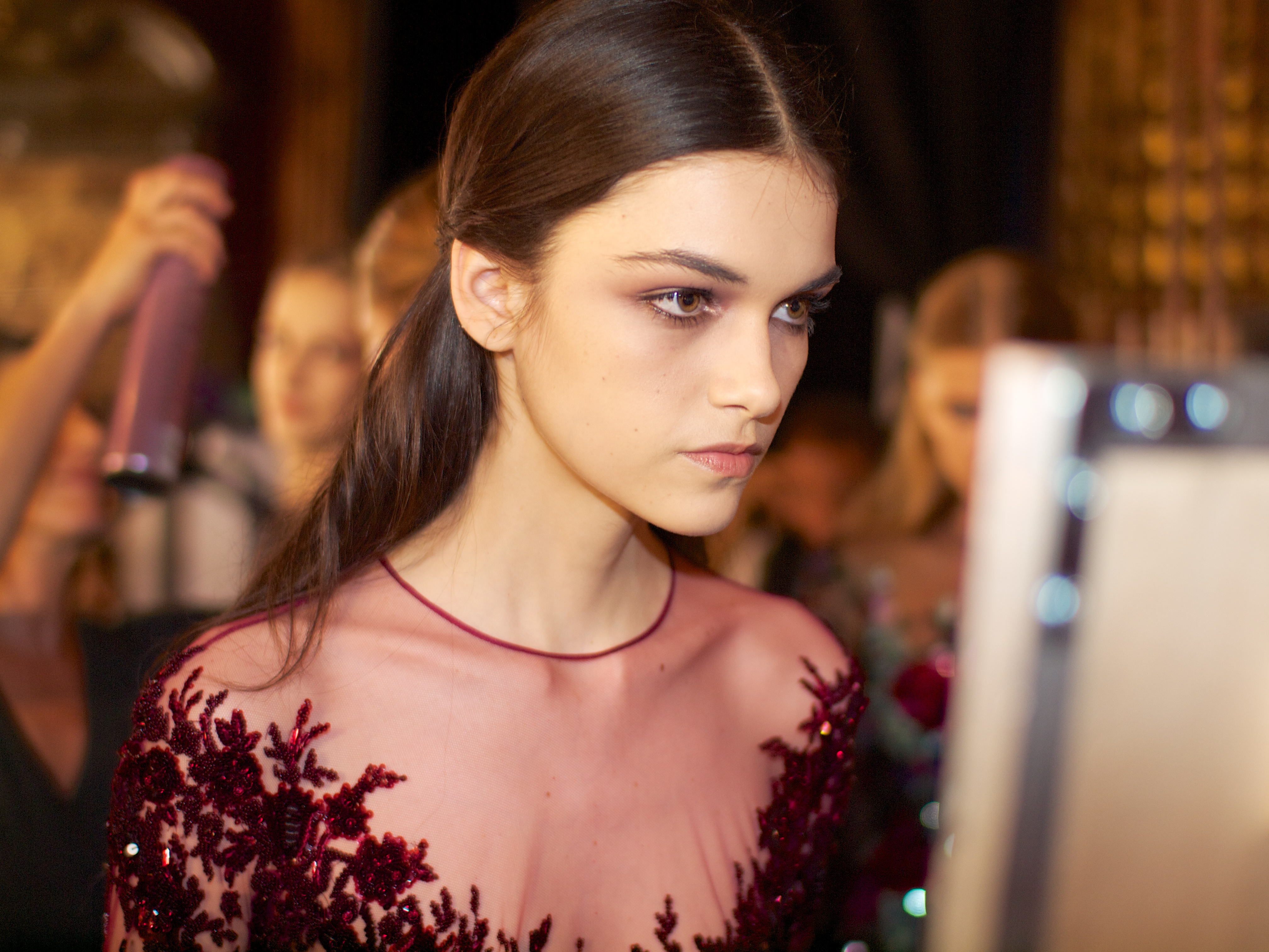 Haute couture automne-hiver 2012-2013